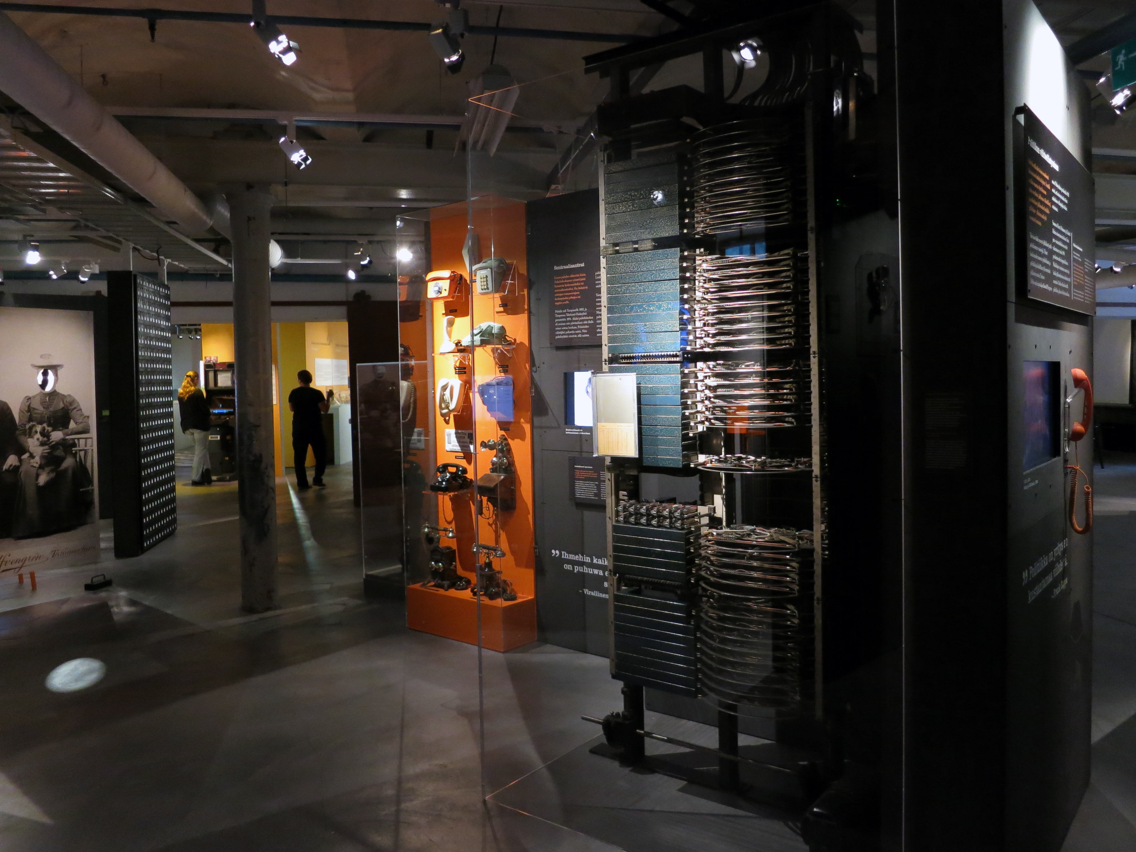 Kuva mediamuseo Rupriikista Finlaysonin alueen näyttelytiloista.